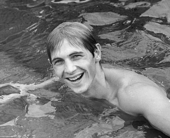 Klaus Katzur